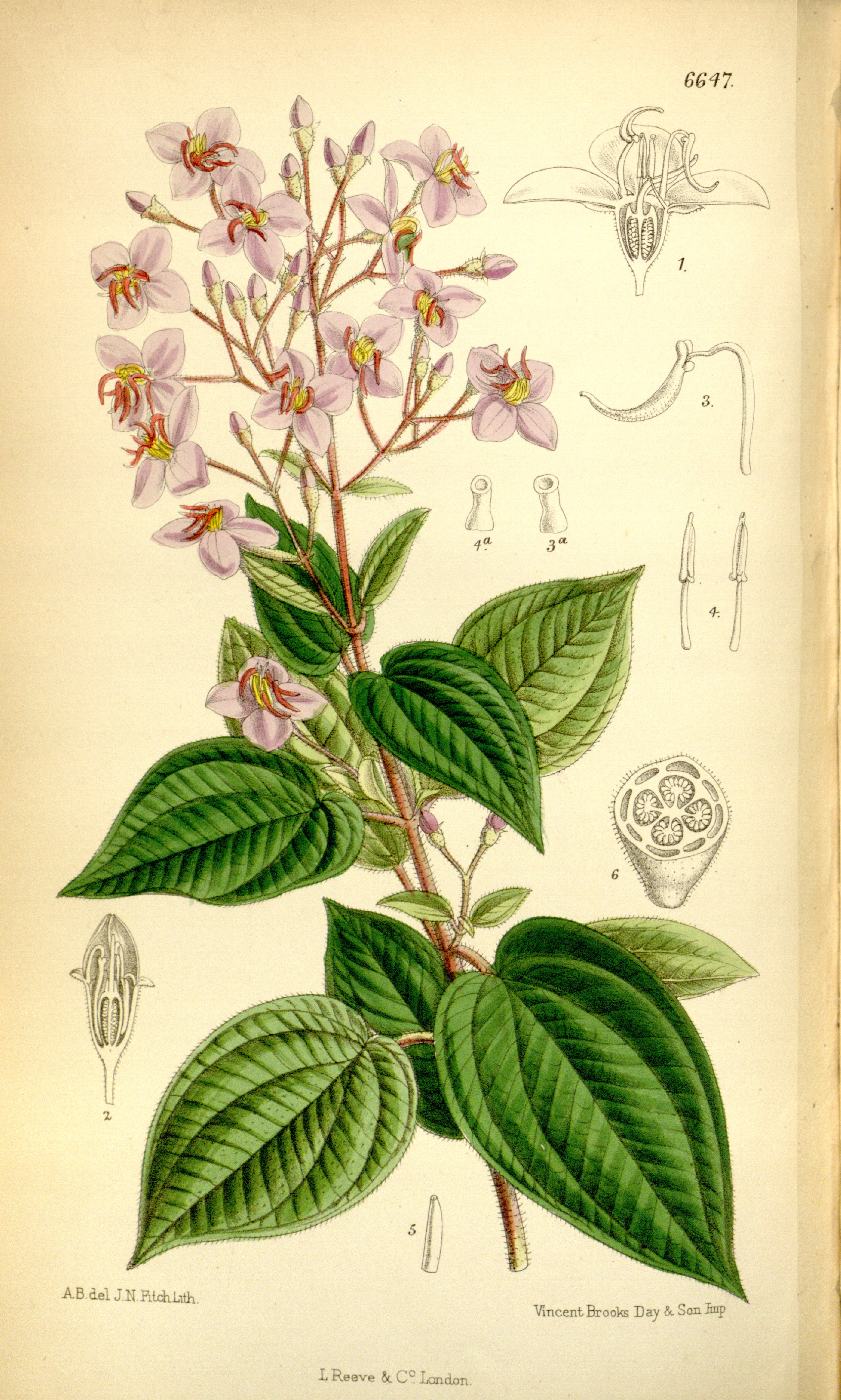 Bredia hirsuta, Melastomataceae